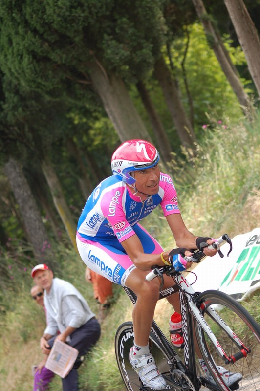 Alessandro Spezialetti, Giro d'Italia 2010